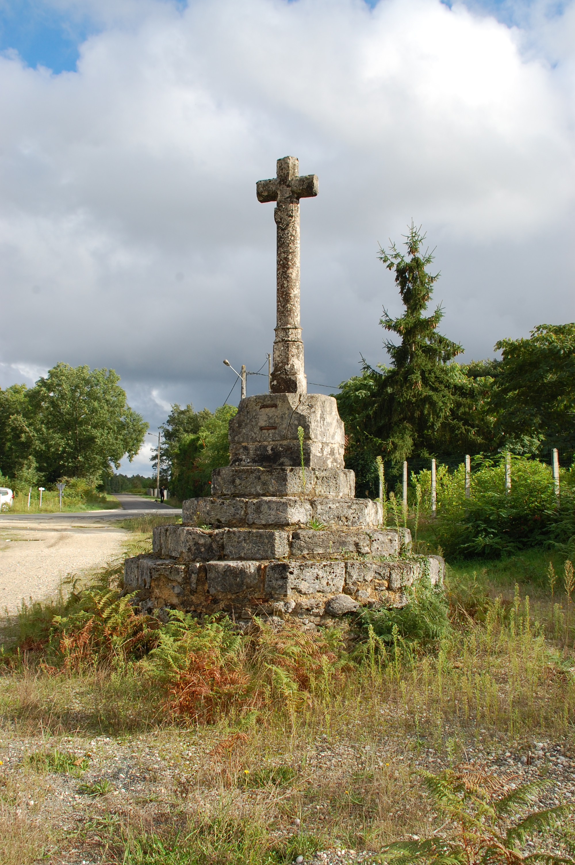 Croix de Villeranque (Inscrit) .